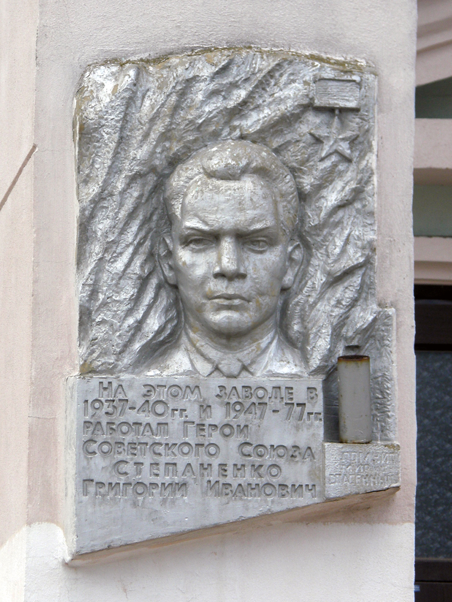 Мемориальная доска Героя Советского Союза Григория Степаненко на Краматорском заводе тяжёлого станкостроения